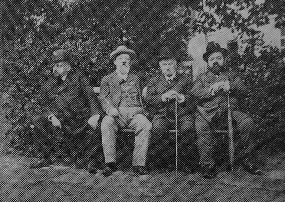 Walerian Krywult, Wątorski, X, Hipolit Neuwirth (1900)